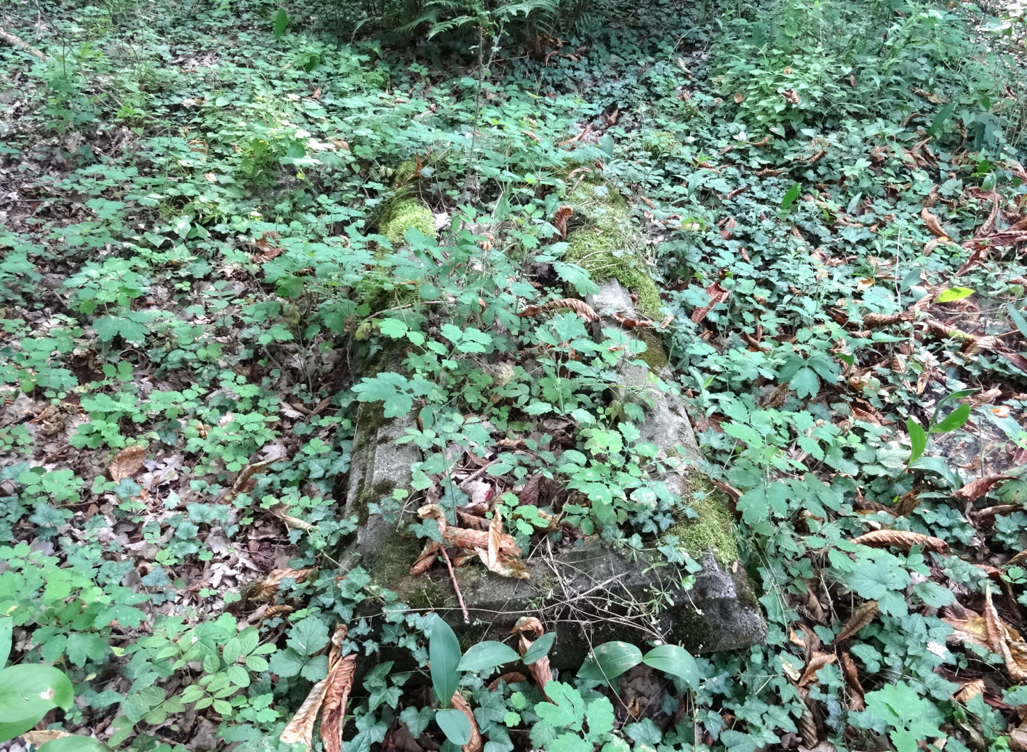 Opuszczony cmentarz poewangelicki w Dobromierzu, gmina Nowa Wieś Wielka, powiat bydgoski